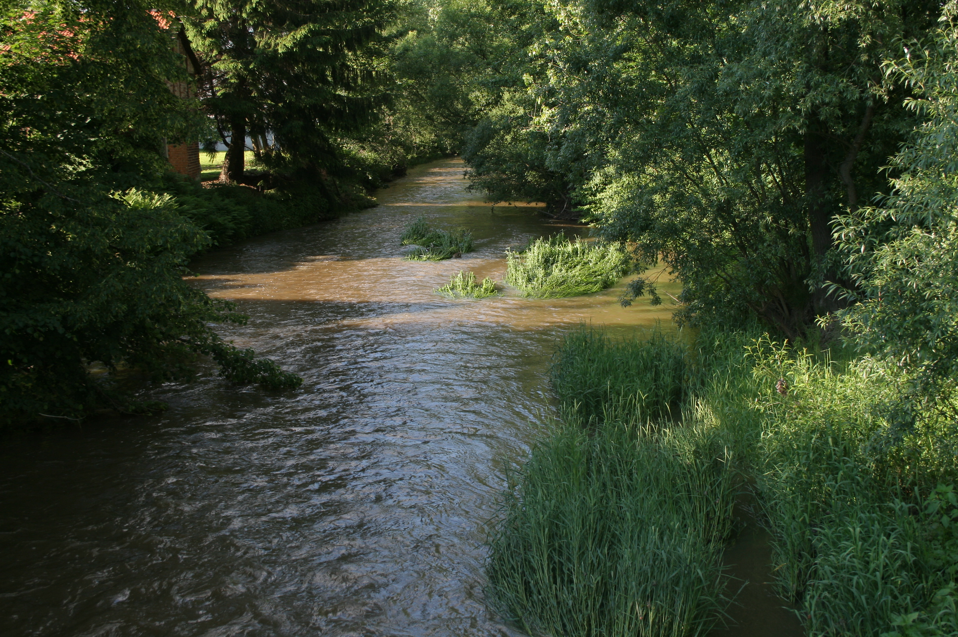 Fluss Schwalm (Eder) in Alsfeld